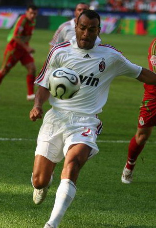 Cafu